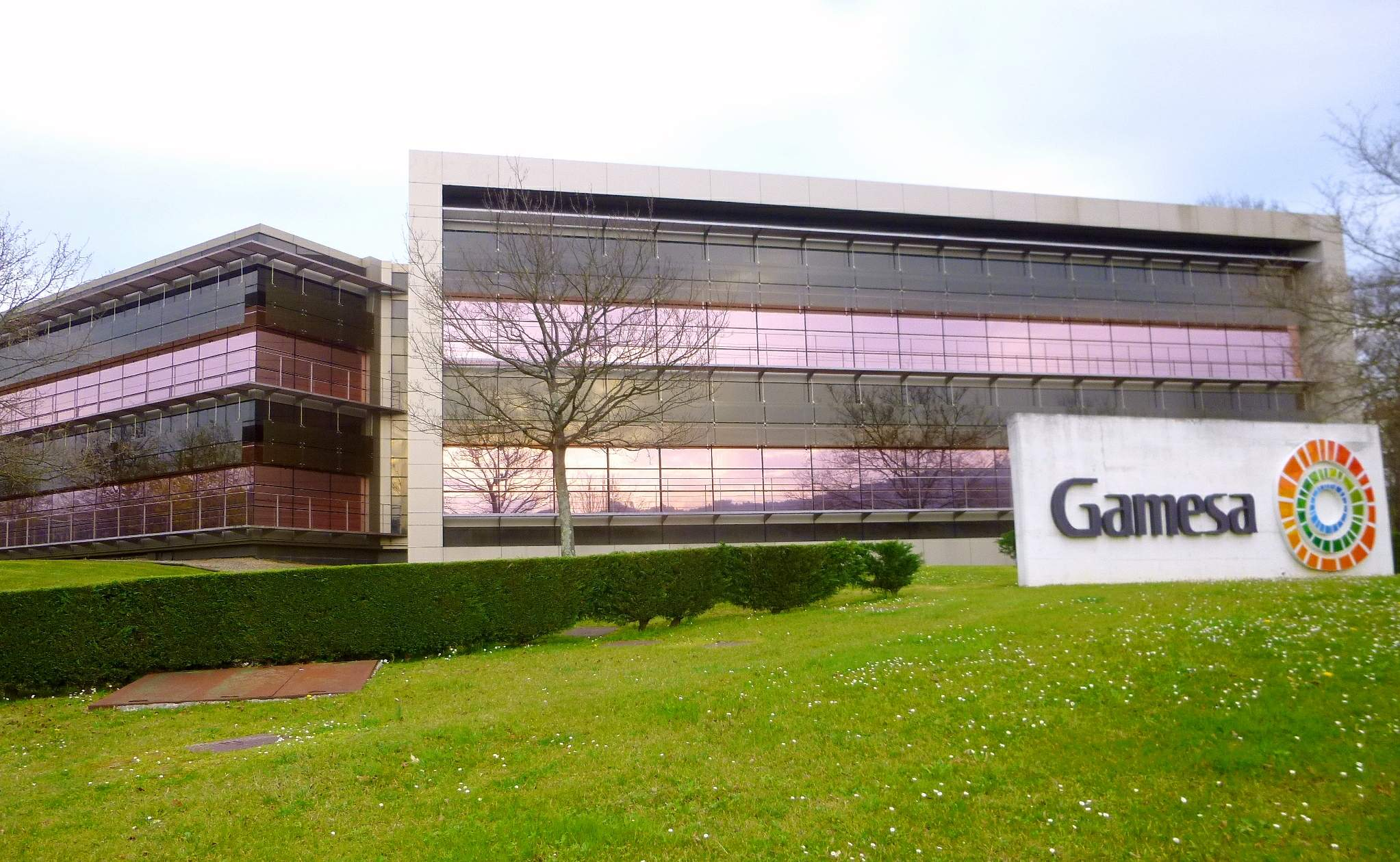 Zamudio - Parque Científico y Tecnológico de Bizkaia, sede central de Gamesa Corporación Tecnológica